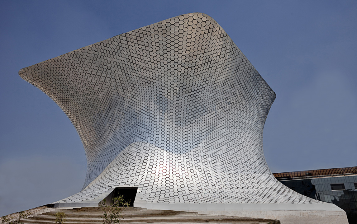 Soumaya FREE Fernando Romero EnterprisE photo by Javier Hinojosa